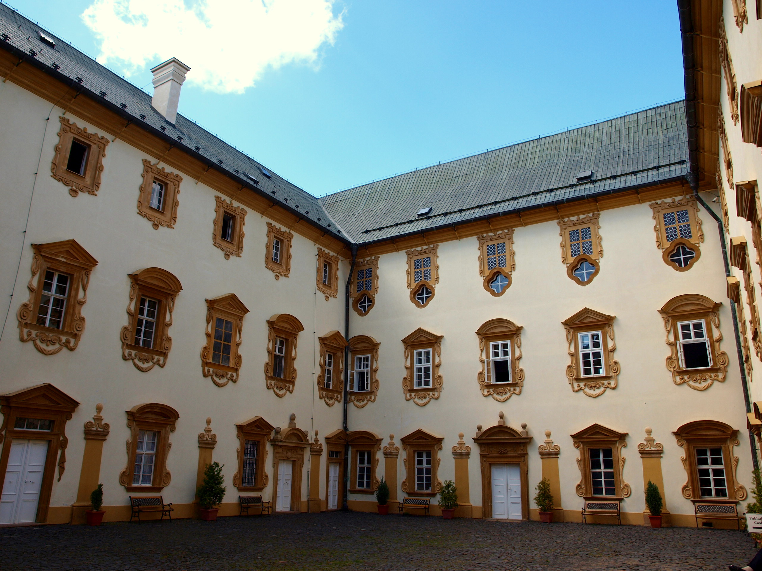 Zámek Lemberk